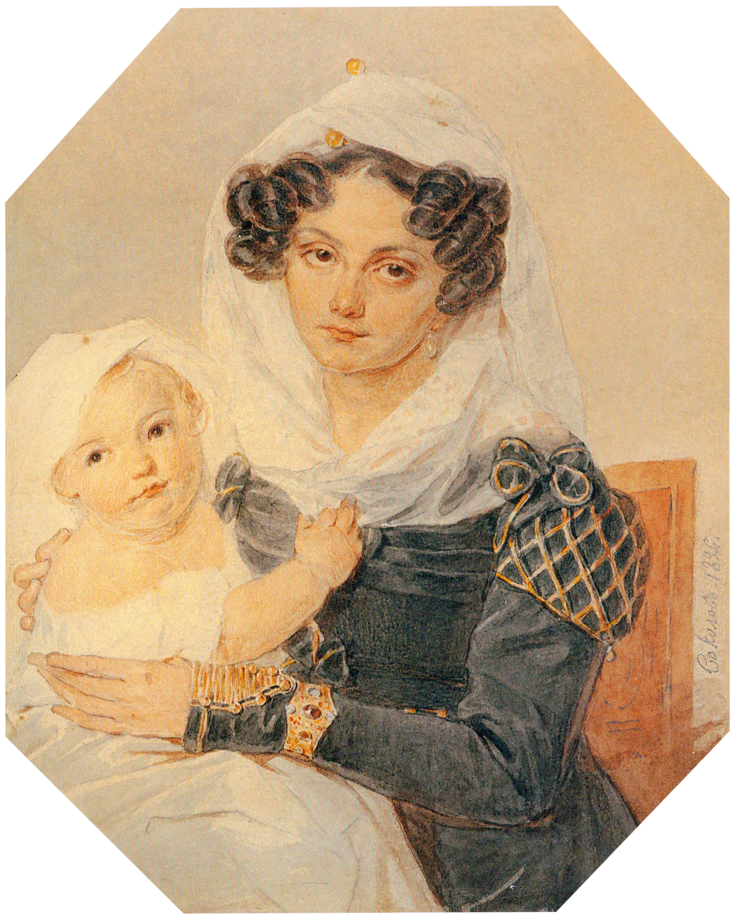 “Портрет княгини Марии Николаевны Волконская с сыном”, 1826. Бумага, графитный карандаш, акварель. 21х17 см. Государственный музей им. А.С. Пушкина, Москва. М.Н. Волконская просила художника сделать повторение этого портрета для своей сестры (Орловой Е.Н), но о судьбе копии ничего не известно. Первый портрет находился у Волконских все 30 лет пребывания в Сибири. В 1910-х годах следы его затерялись. В 1966 г. он был обнаружен в Париже, в собрании В.К. Звягинцева, дальнего родственника Волконских. В 1968 г. В.К. Звягинцев подарил портрет музею.